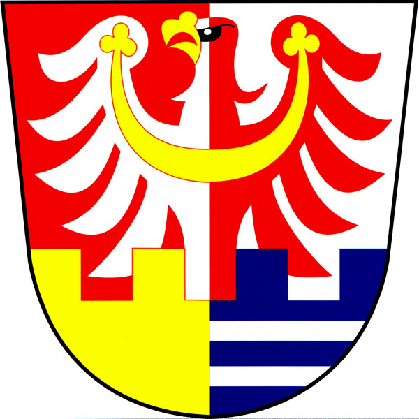 Znak obce Petrohrad